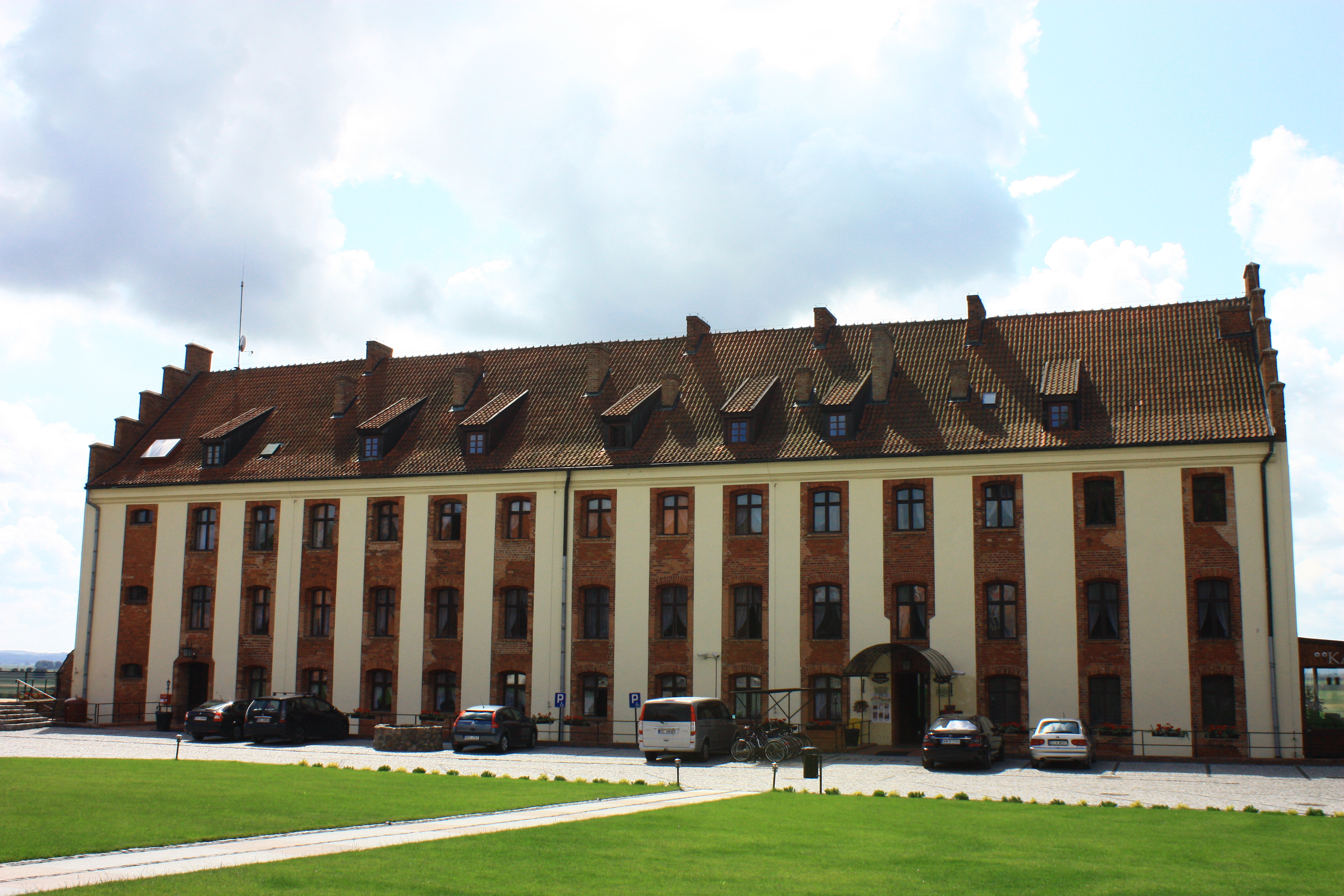 Gniew, pałac Marysieńki, 1674, XIX